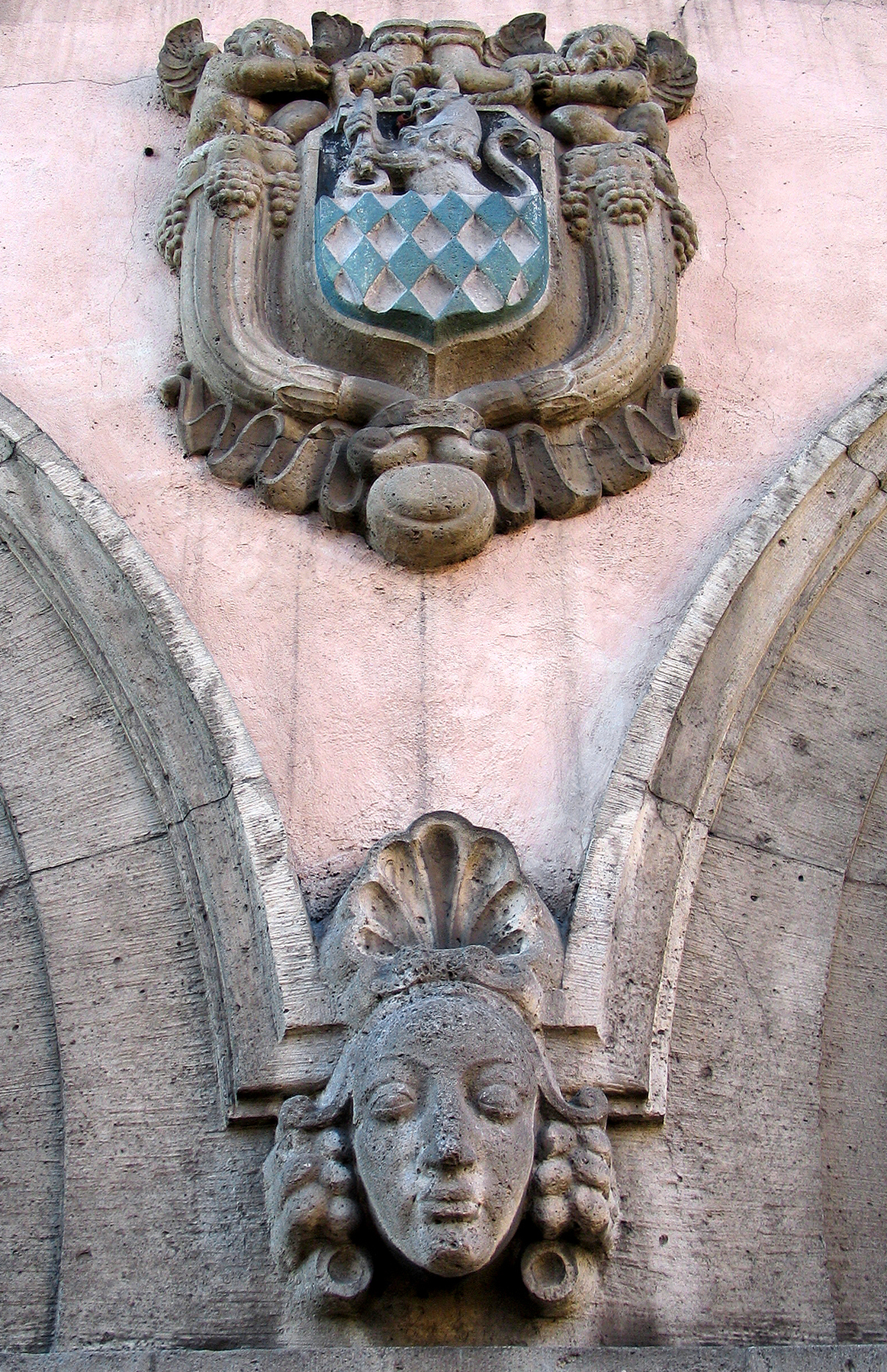 Bauschmuck des Bildhausers Ludwig Vierthaler an der Fassade des Georg von Cölln-Hauses, Am Markte 8 in Hannover gegenüber dem Eingang der Marktkirche; zwischen den Pfeilern der Arkaden ein typischerweise aus Muschelkalk gehauener Kopf, darüber ein zum Zeitpunkt des Hochladens noch unidentifiziertes Wappen mit einem über Rauten nach links blickenden Löwen, der einen Schlüssel hält, möglicherweise das Wappen der Herkunft von Georg von Cölln ...